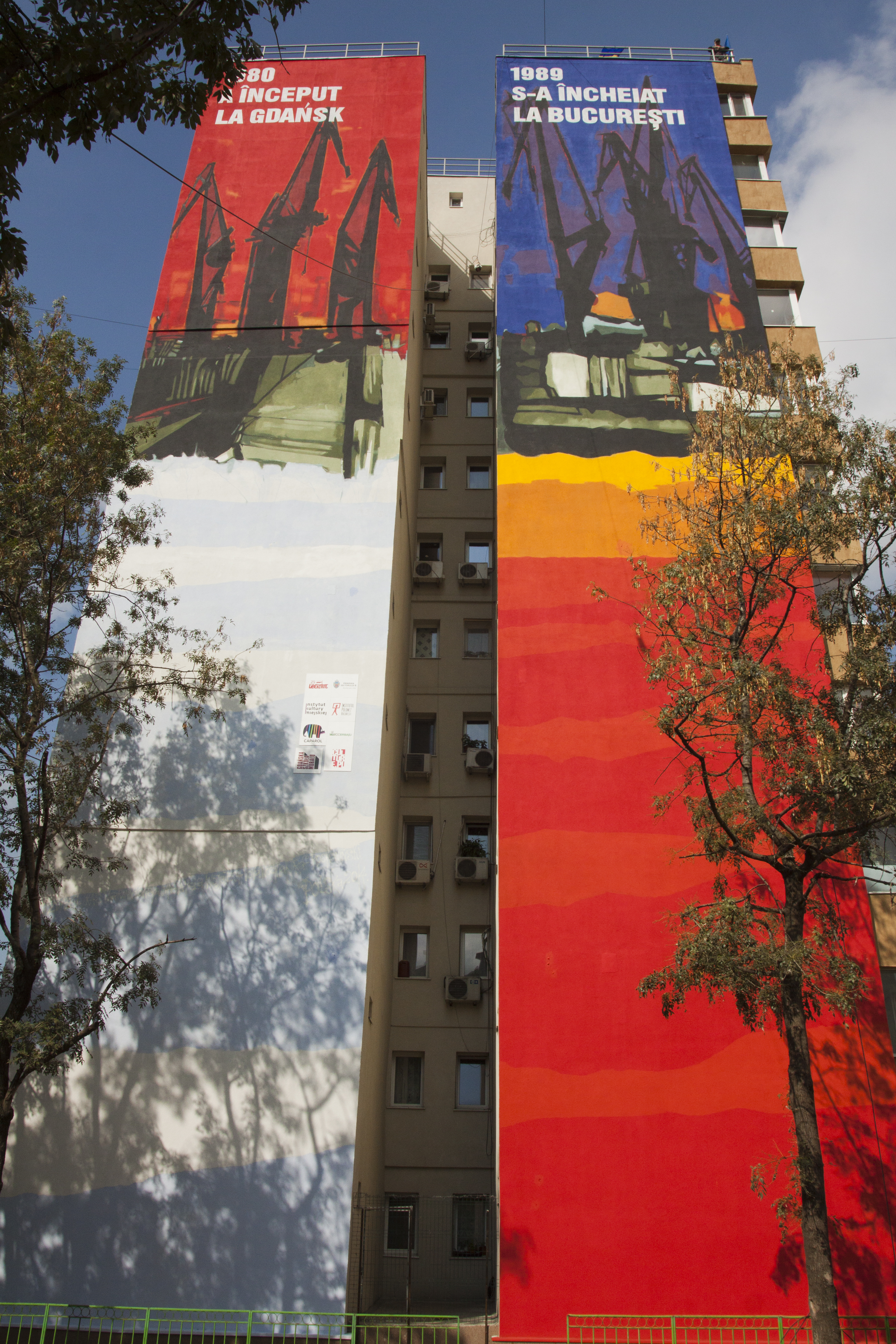 Rafał Roskowiński - materiały ze zbiorów autora.